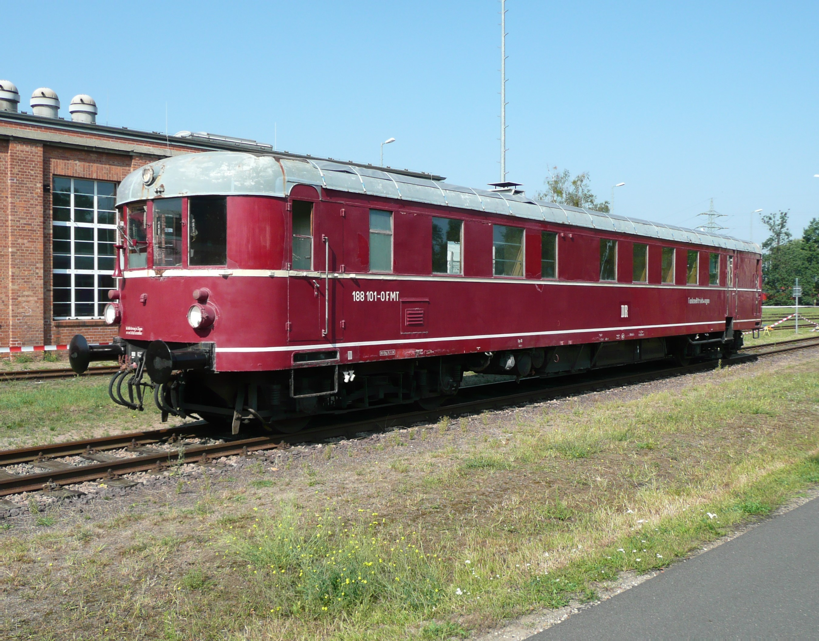 VT 137 063 als Funkmeßtriebwagen im Aw Dessau